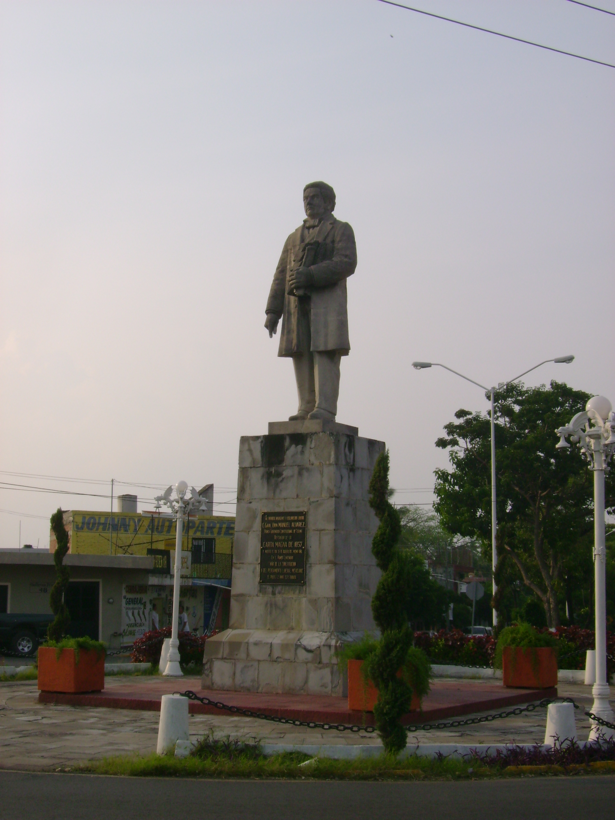 Estatua del General Manuel Alvarez